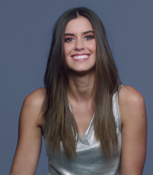 Paulina Vega promocionando Falabella en 2016